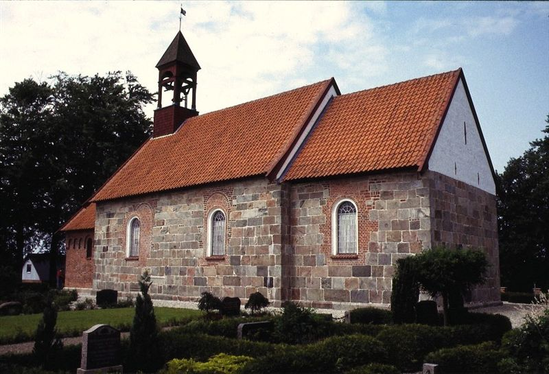 Kirken set fra sydøst Skorup kirke er en kirke i Silkeborg Provsti (Århus Stift). Sognet ligger i Silkeborg Kommune, (før 2007 Gjern Kommune); indtil Kommunalreformen i 1970 lå det i Gjern Herred (Skanderborg Amt). Apsis, kor og skib er opført i romansk tid af granitkvadre